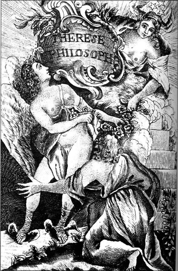 Illustration by François-Rolland Elluin of Thérèse philosophe, ou, Mémoires pour servir à l'histoire du Père Dirrag et de Mademoiselle Éradice by Jean-Baptiste de Boyer d'Argens (1704-1771)